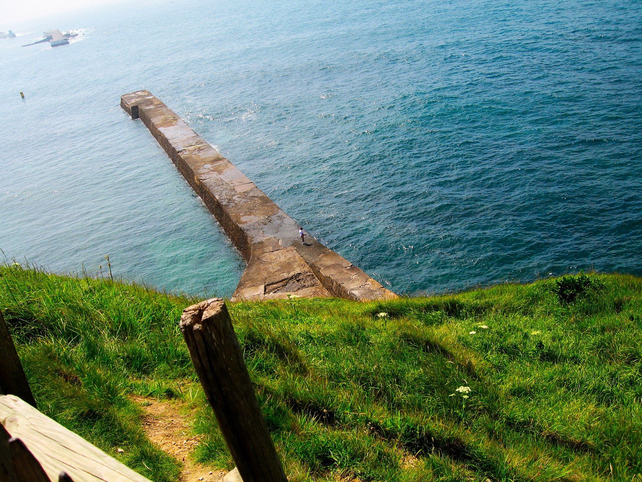 Saint-Jean-de-Luz, France.